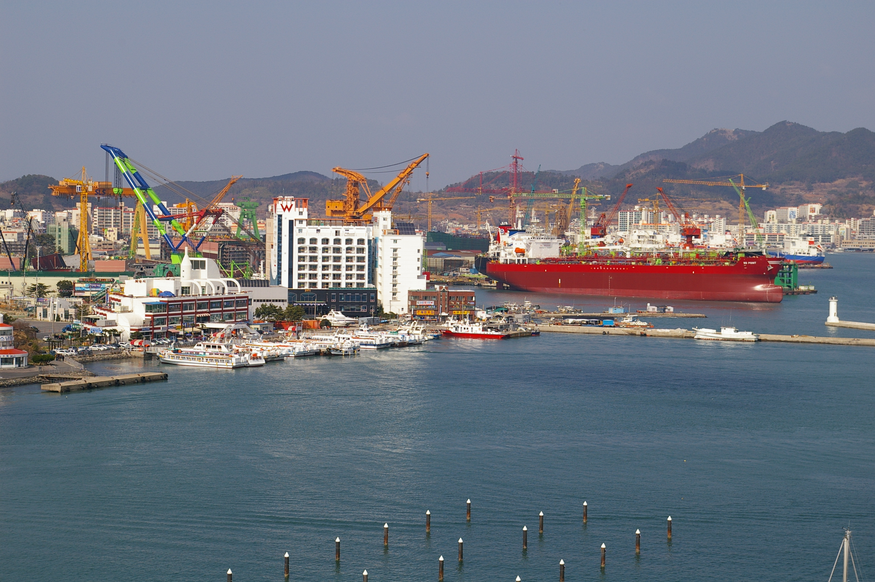 (한국어) 통영항